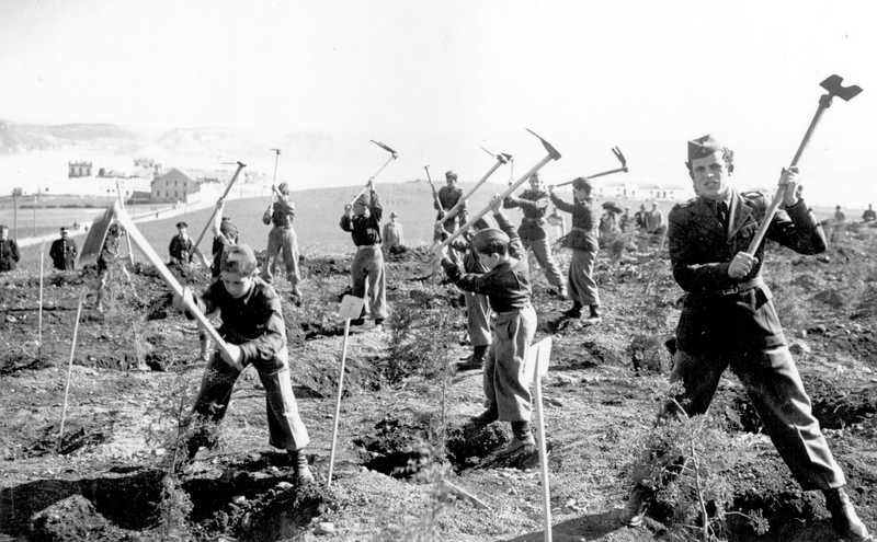 Mocidade Portuguesa / Uniforme / Parque Florestal de Monsanto (Lisboa)